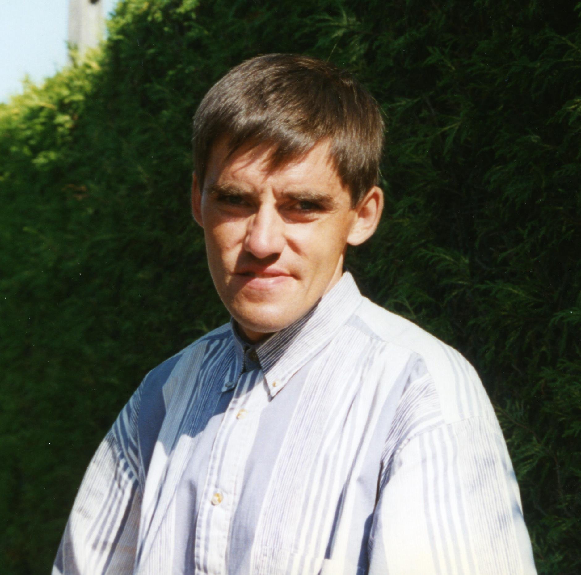 CRITERIUM DE LEVES 1996